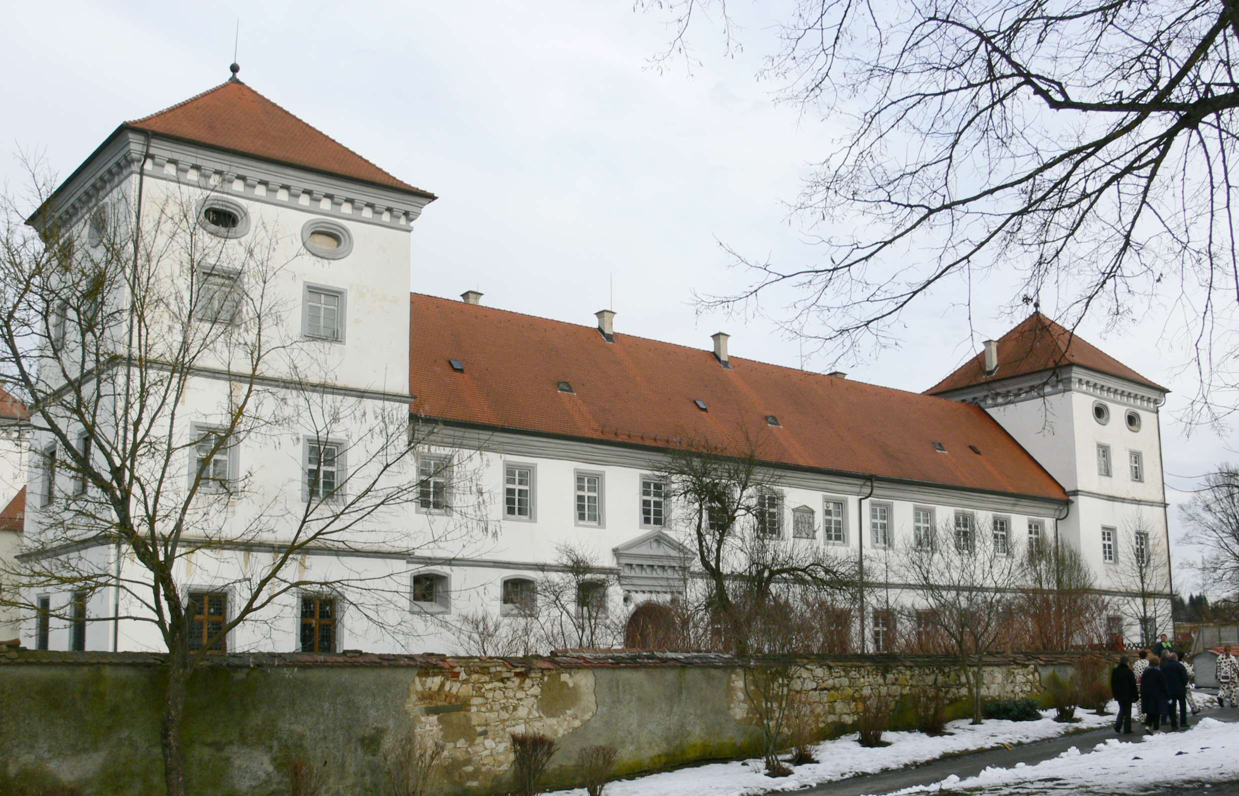 Meßkirch, Germany: Schloss, Westflügel (Parkflügel), Parkseite